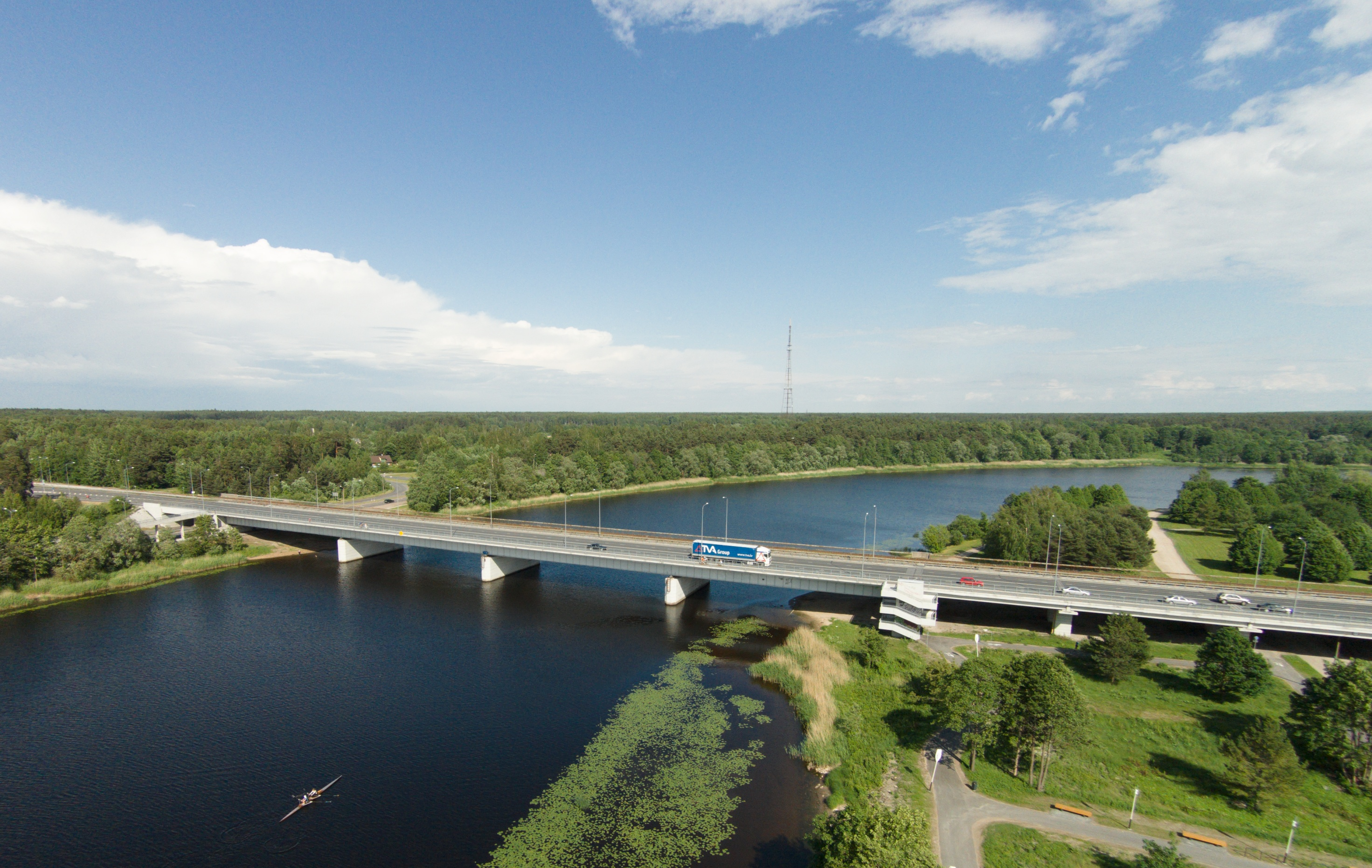 Papiniidu sild Pärnus